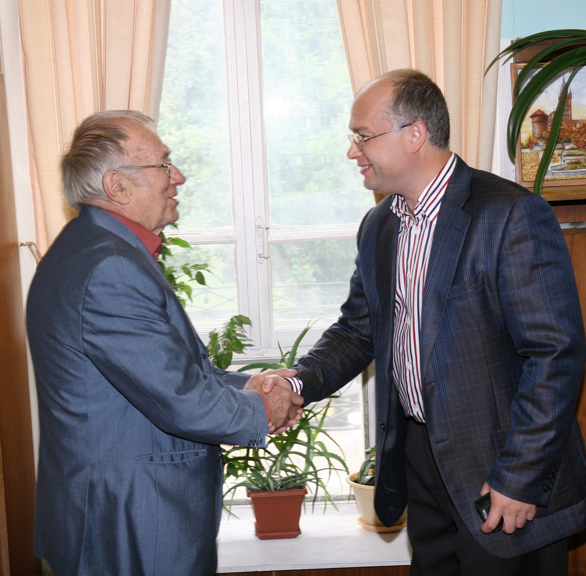 Москва. 11. 08. 2011 г. Главный редактор Станислав Куняев и глава Международного Шолоховского комитета Андрей Черномырдин.